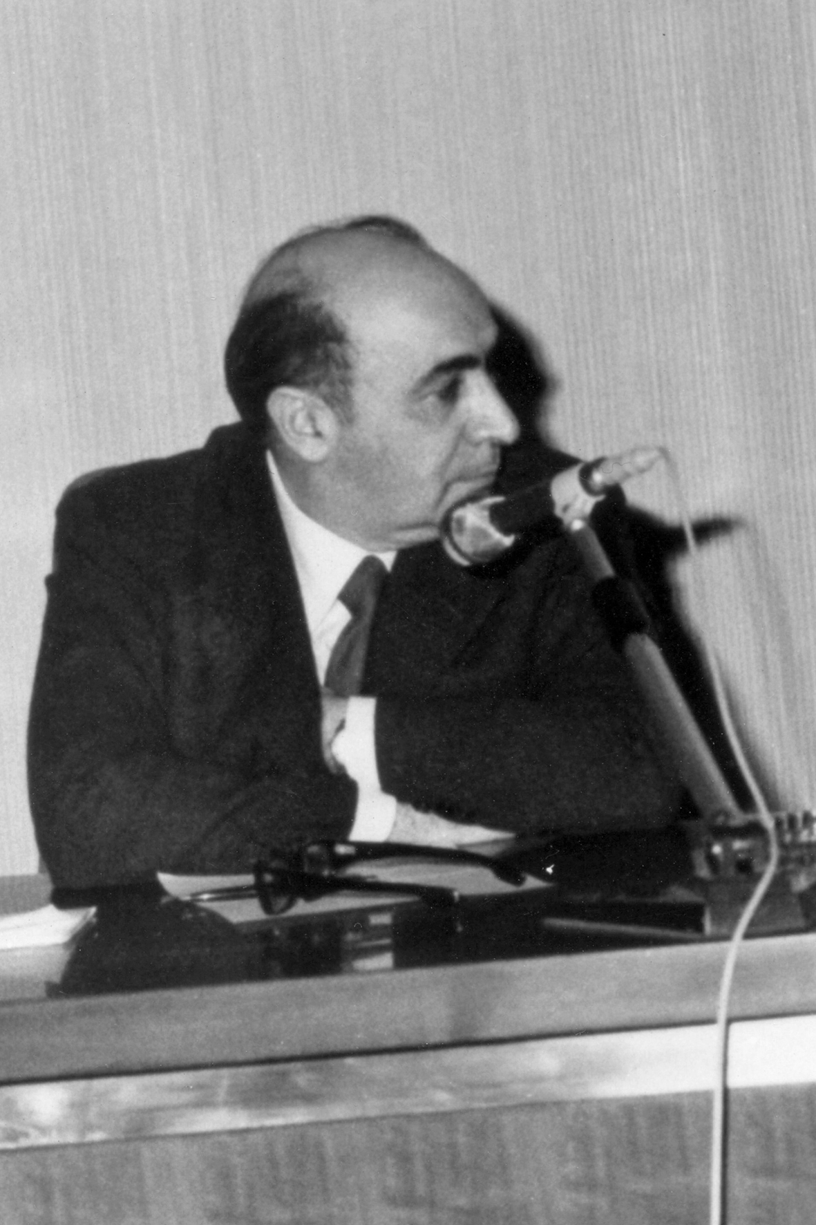 Andrea Vasa - Società Filosofica Italiana - Convegno dell'Aquila